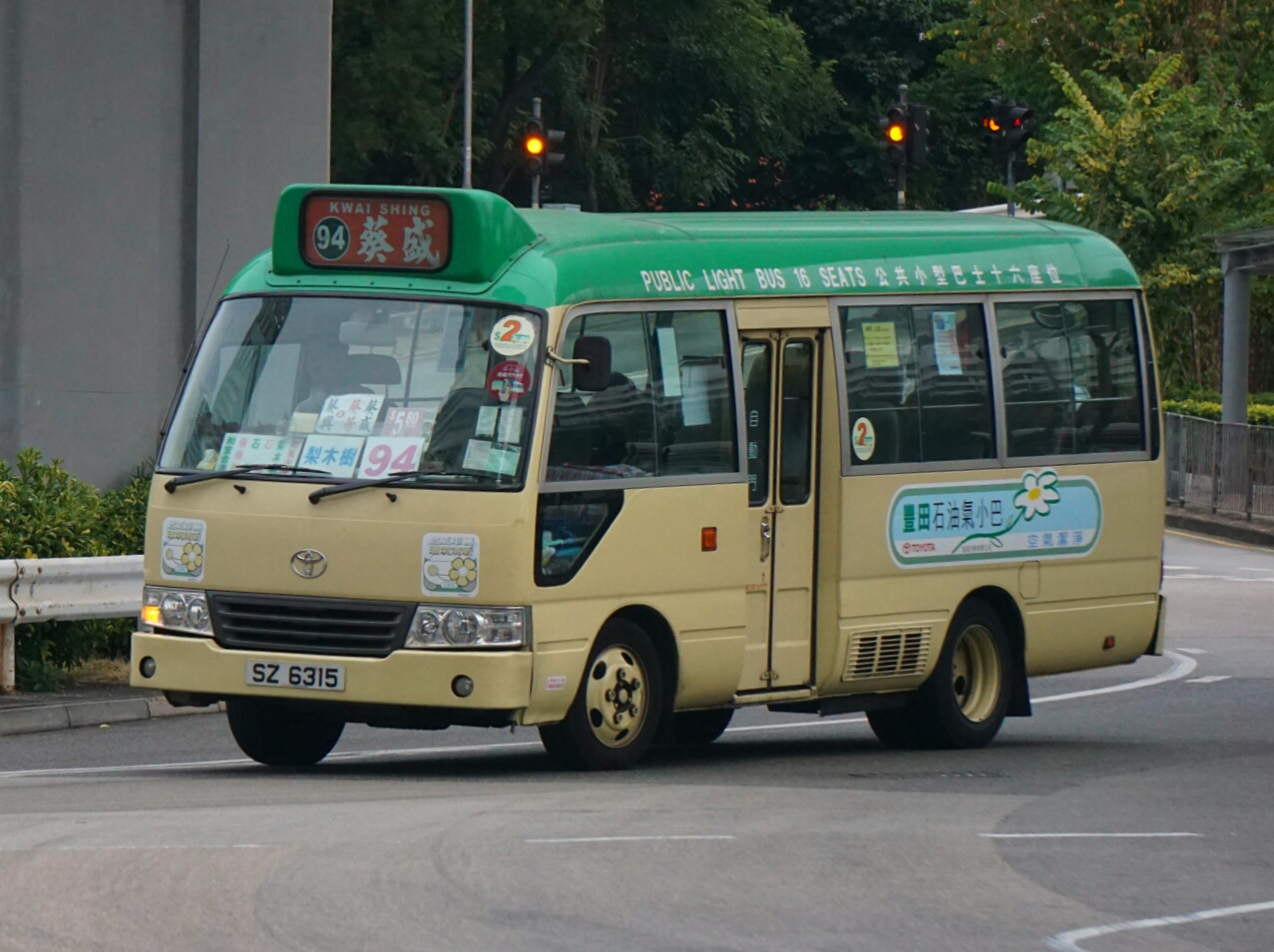 中文（香港）: 新界區專線小巴94線，正途經葵福路近貨櫃碼頭路交匯處